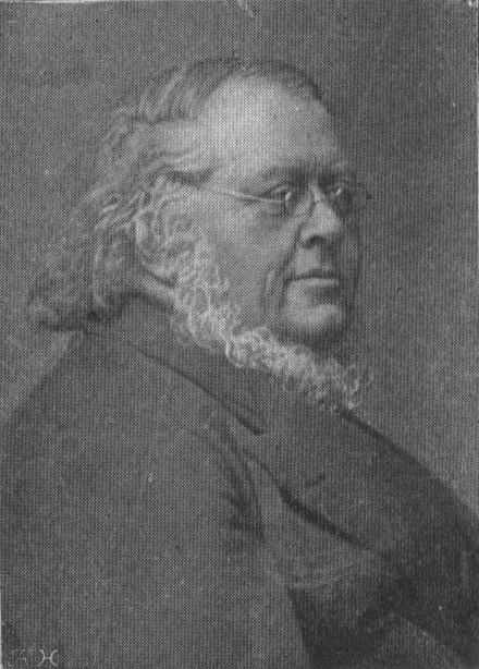 Den norske forfatteren Peter Christen Asbjørnsen.